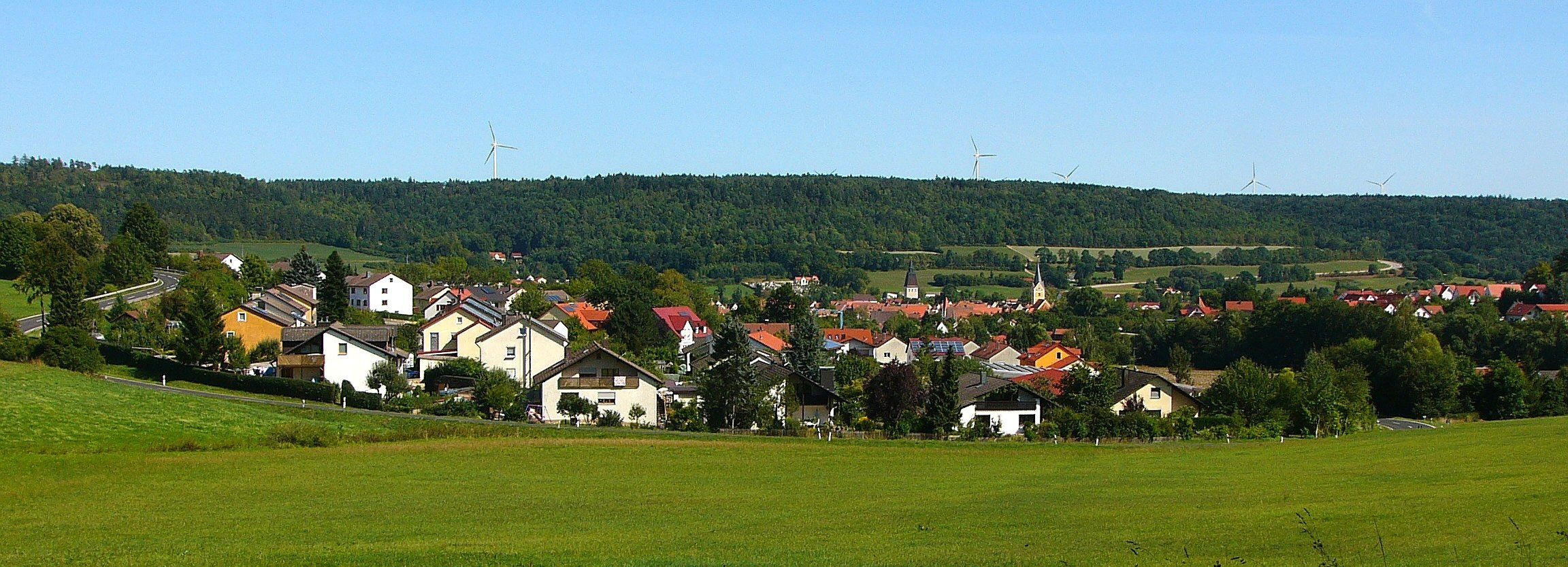 Blick auf Berching